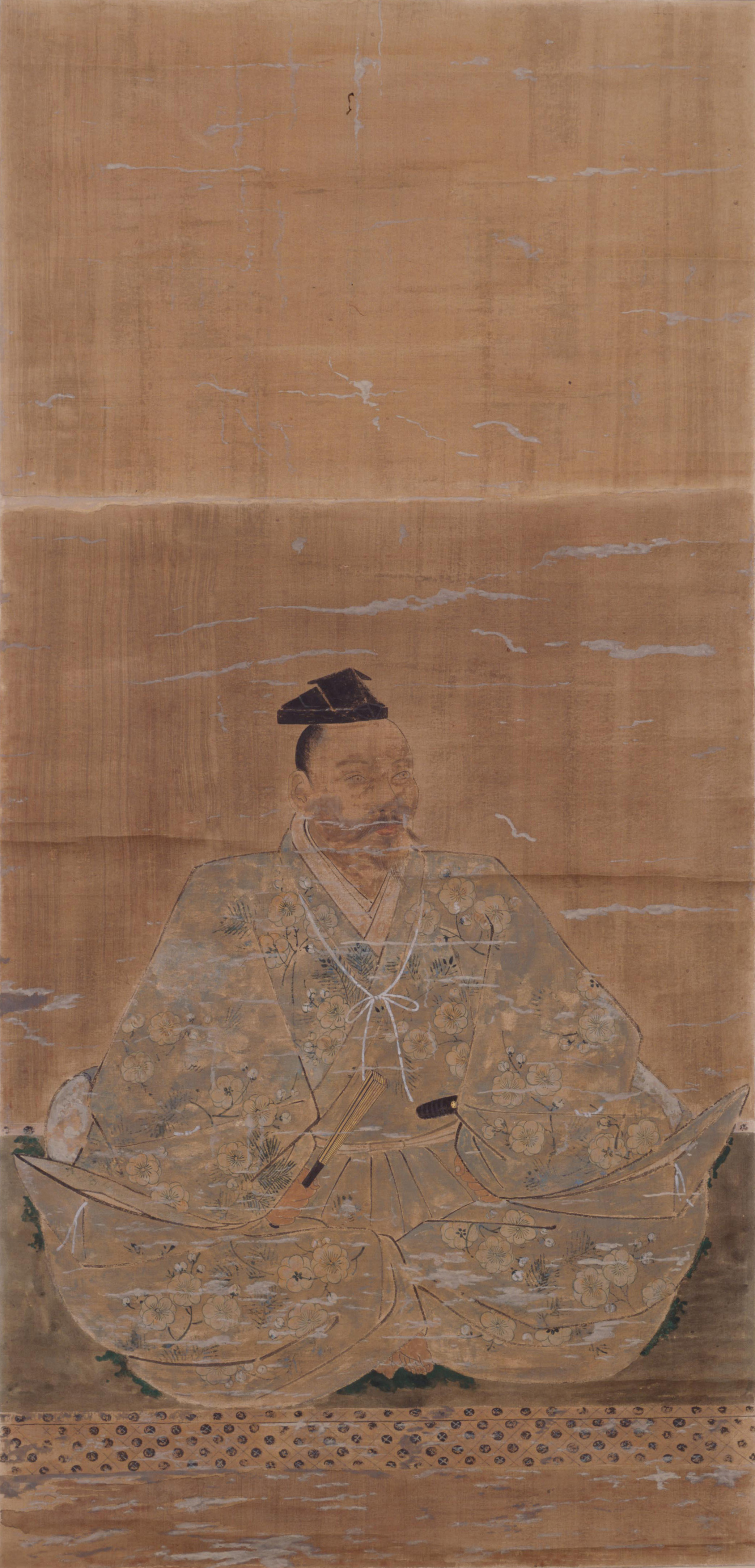 細川持賢の肖像。